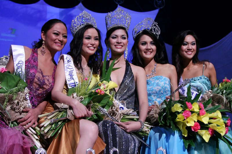 Binibining Pilipinas 2008 Winning Beauties Jennifer Barrientos Bb. Pilipinas 2008 - Universe Patricia Fernandez Bb. Pilipinas 2008 - International Janina San Miguel Bb. Pilipinas 2008 - World Danielle Castano Bb. Pilipinas 2008 - 1st Runner-up Elizabeth Jacqueline Nacuspag Bb. Pilipinas 2008 - 2nd Runner-up